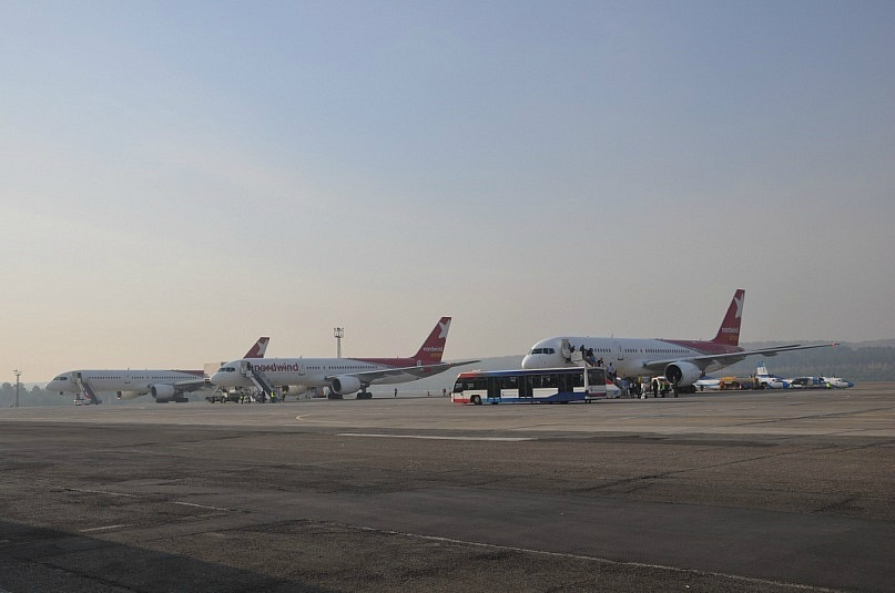 757 nordwind in yemelyanovo